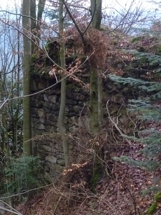 Burgruine_Harchheim_-_Westseite